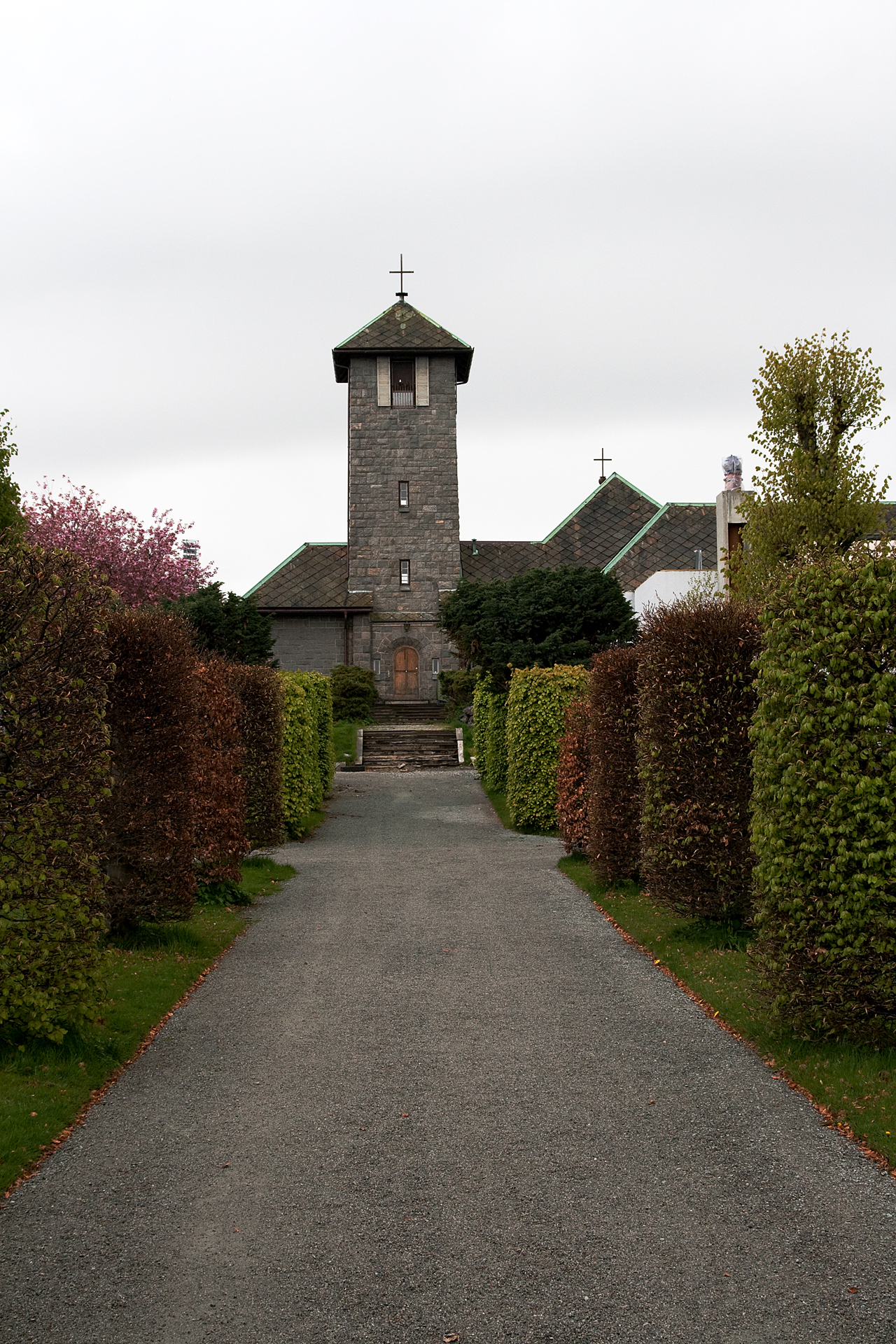 Eiganes gravlund krematoriet